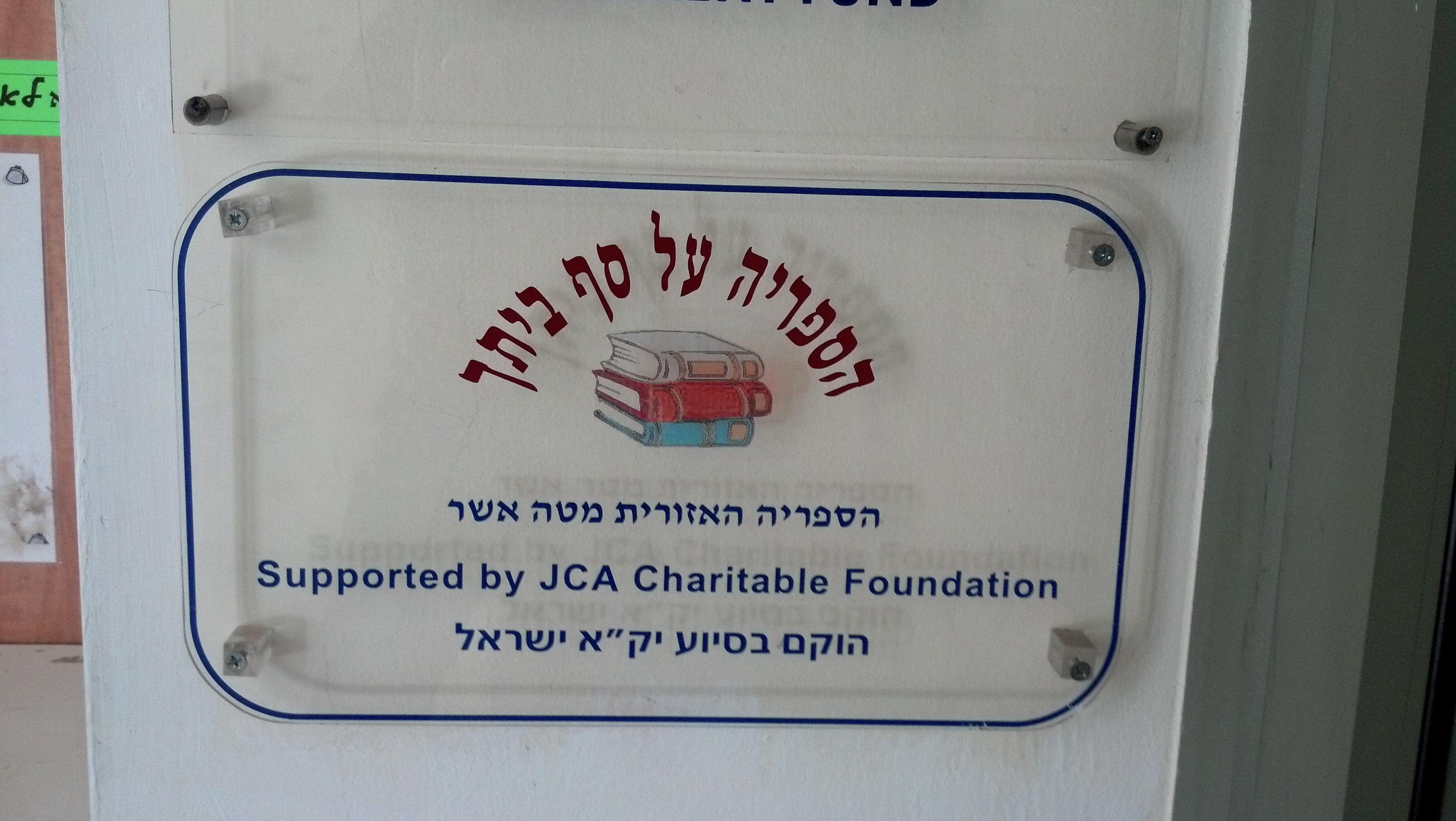 הספריה האזורית מטה אשר - השאלה עד סף הבית